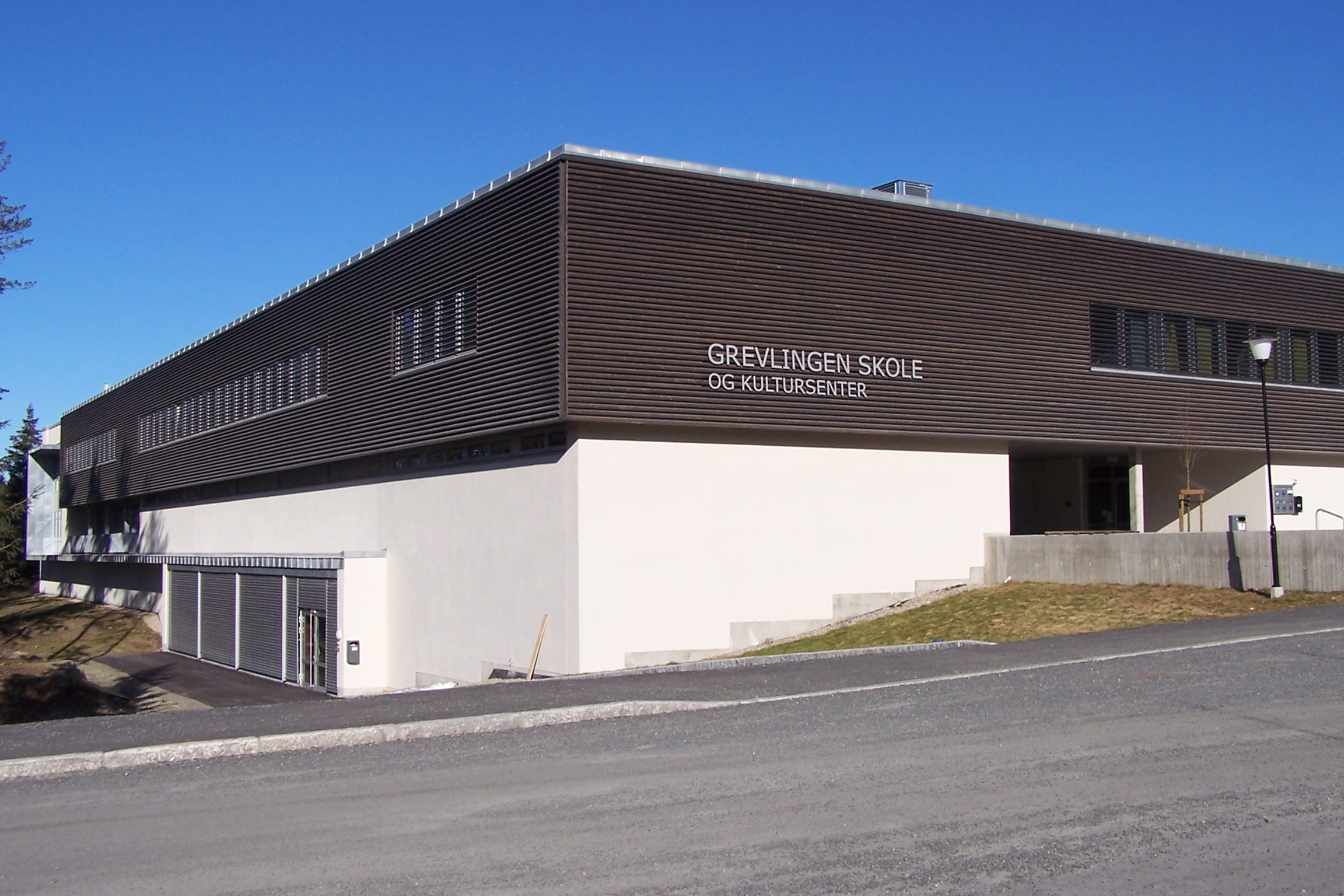 Grevlingen skole og kultursenter (Grevlingen School and Cultural Centre) in Son, Norway